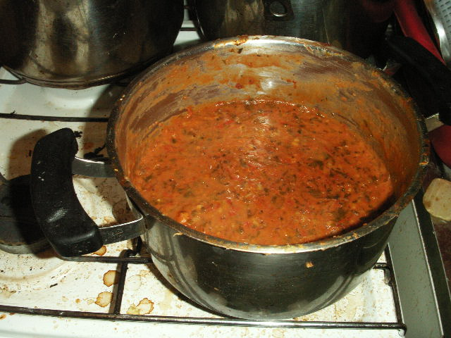 Ragù in pentola